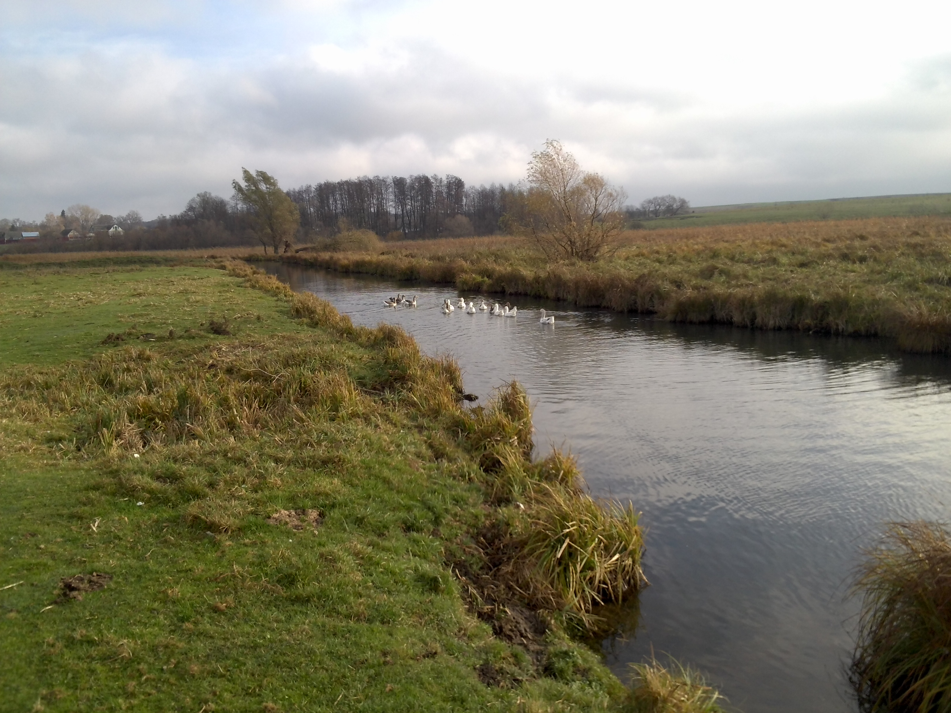 с. Косаківка. На річці